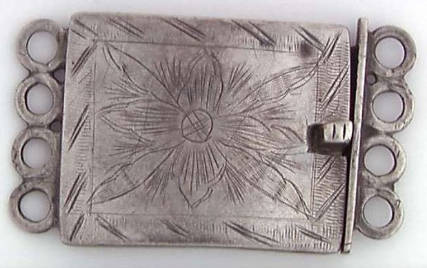 Hattespenne i sølv med gravert dekor og med en form tatt etter kasselåser som har vært brukt til halskjeder. Denne typen ble mye brukt som hattespenne i Setesdal. Innkjøpt til i 1918 i Bygland i Aust-Agder. Foto Anne-Lise Reinsfelt / Norsk Folkemuseum, NF.1918-0936.